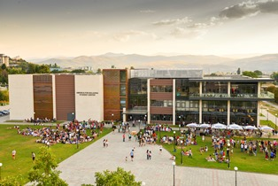 Кампус "Скаптопара" на Американския университет в България